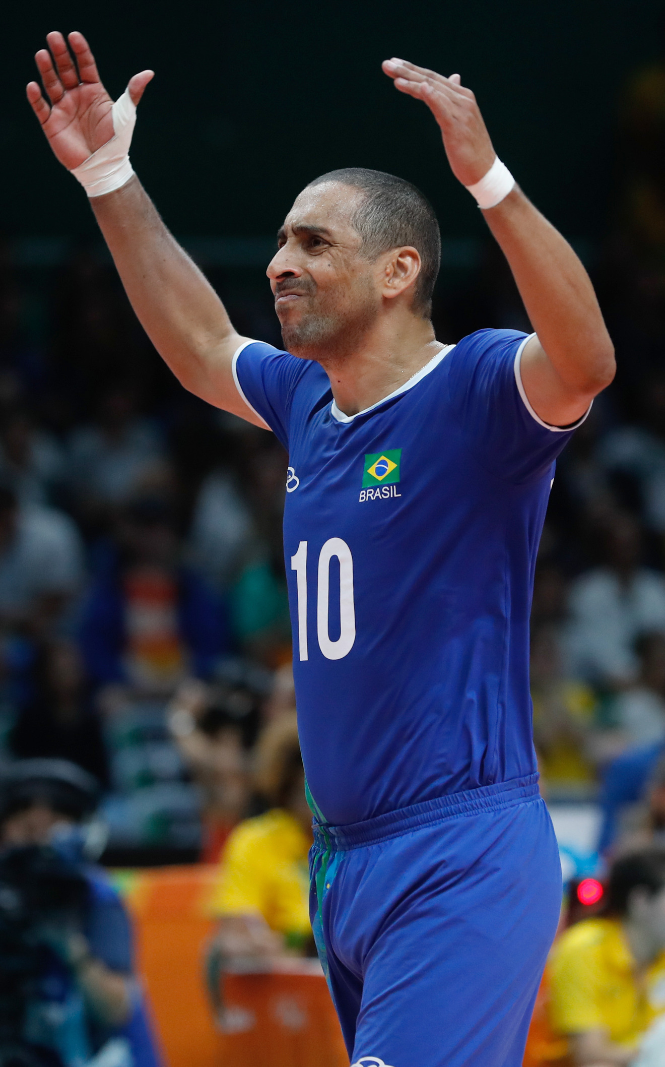 Rio de Janeiro - Seleção brasileira masculina de vôlei vence a da França por 3 sets a 1 no Maracanãzinho e vai às quartas-de-final (Fernando Frazão/Agência Brasil)